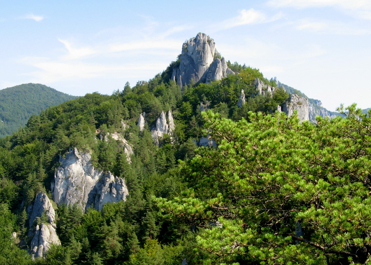 Súľovské skaly